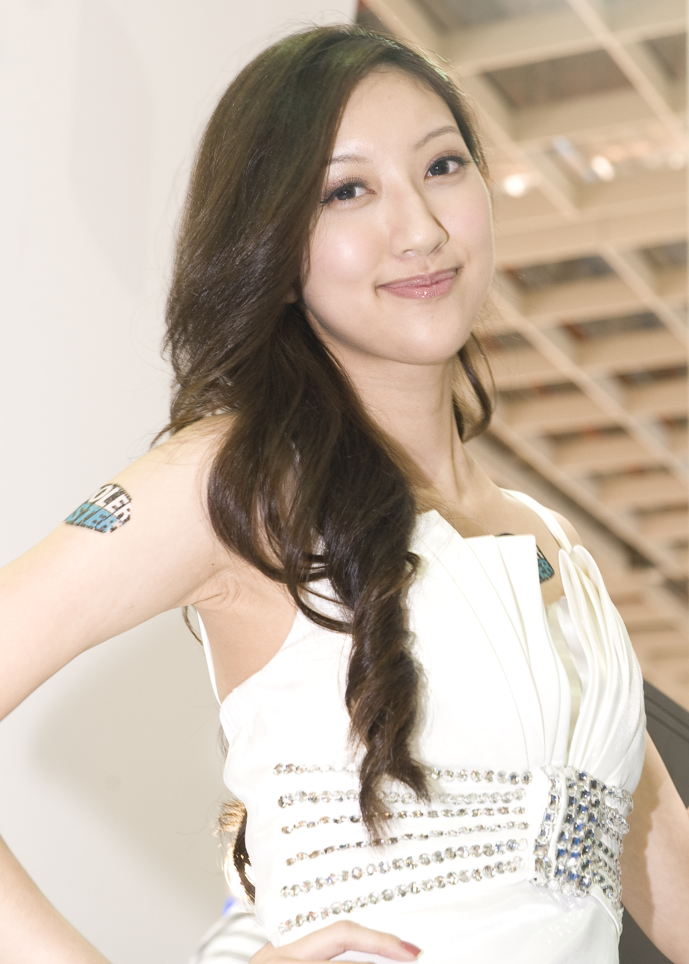 2012台北國際電腦展，訊凱國際宣傳模特兒。